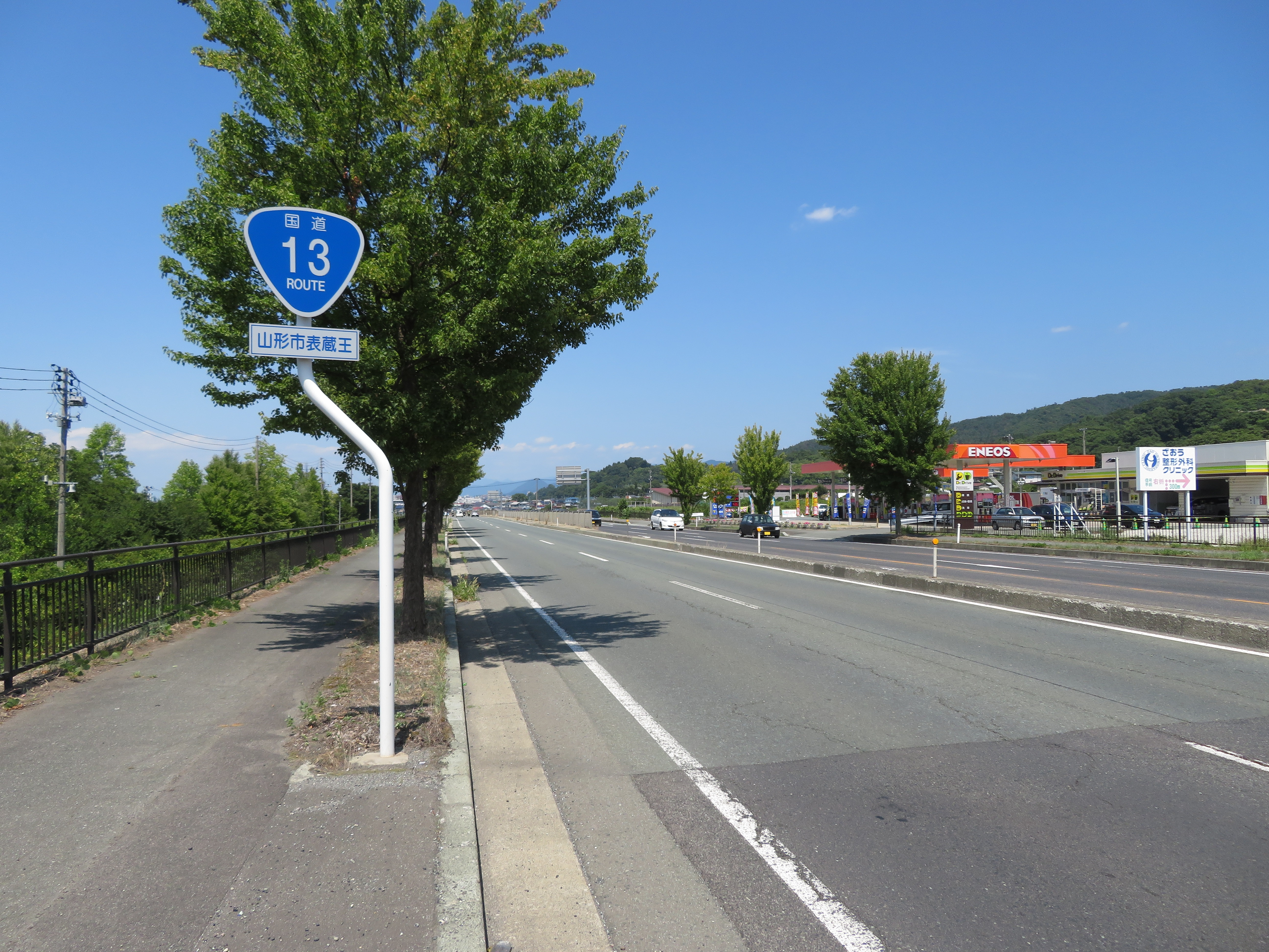 国道13号線山形バイパス山形市表蔵王付近（天童方面を撮影） Canon PowerShot SX720 HS